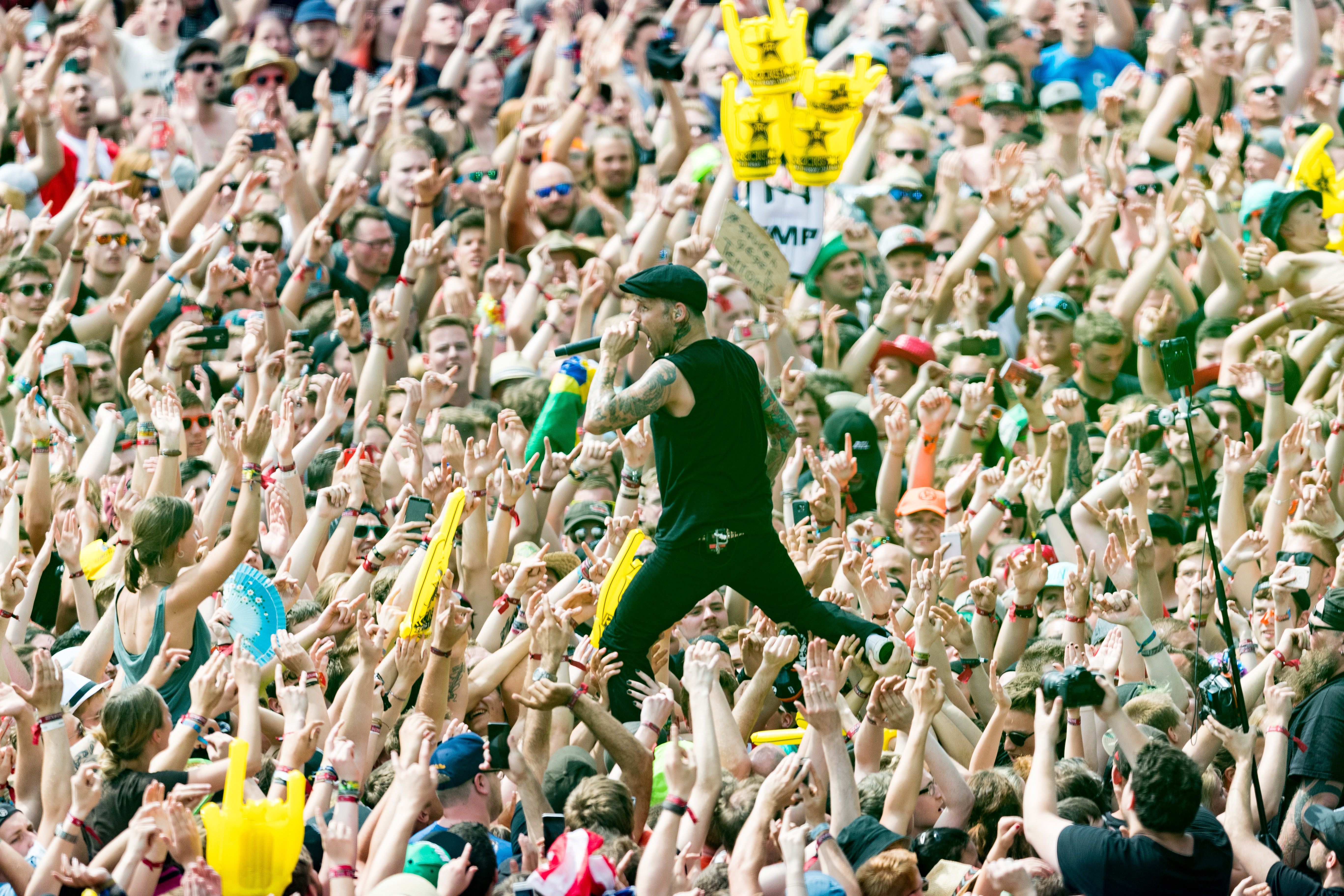 Donots during Rock am Ring at Nürburgring, Nürburg, Rheinland Pfalz, Germany on 2017-06-03, Photo: Sven Mandel